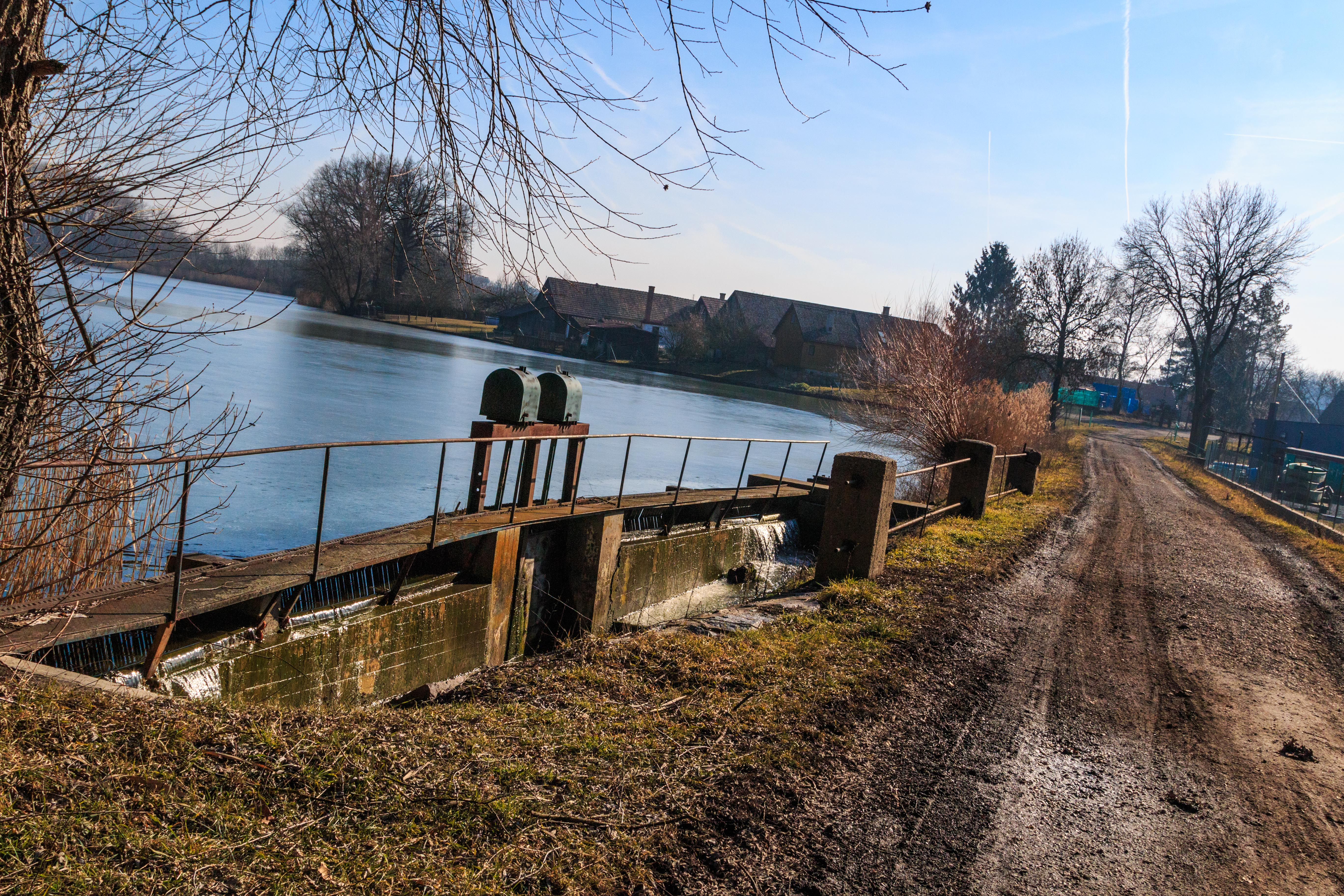 Rybník Bílek u Malého Nouzova Project: Vodstvo. Ticket: 1711.